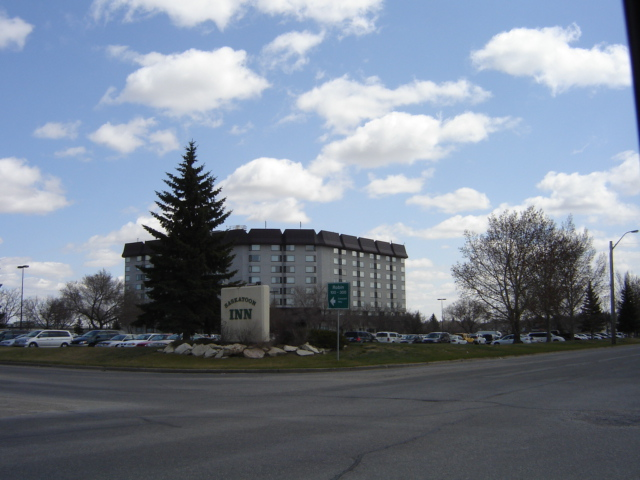 Saskatoon Inn, Airport Business Area, Saskatoon